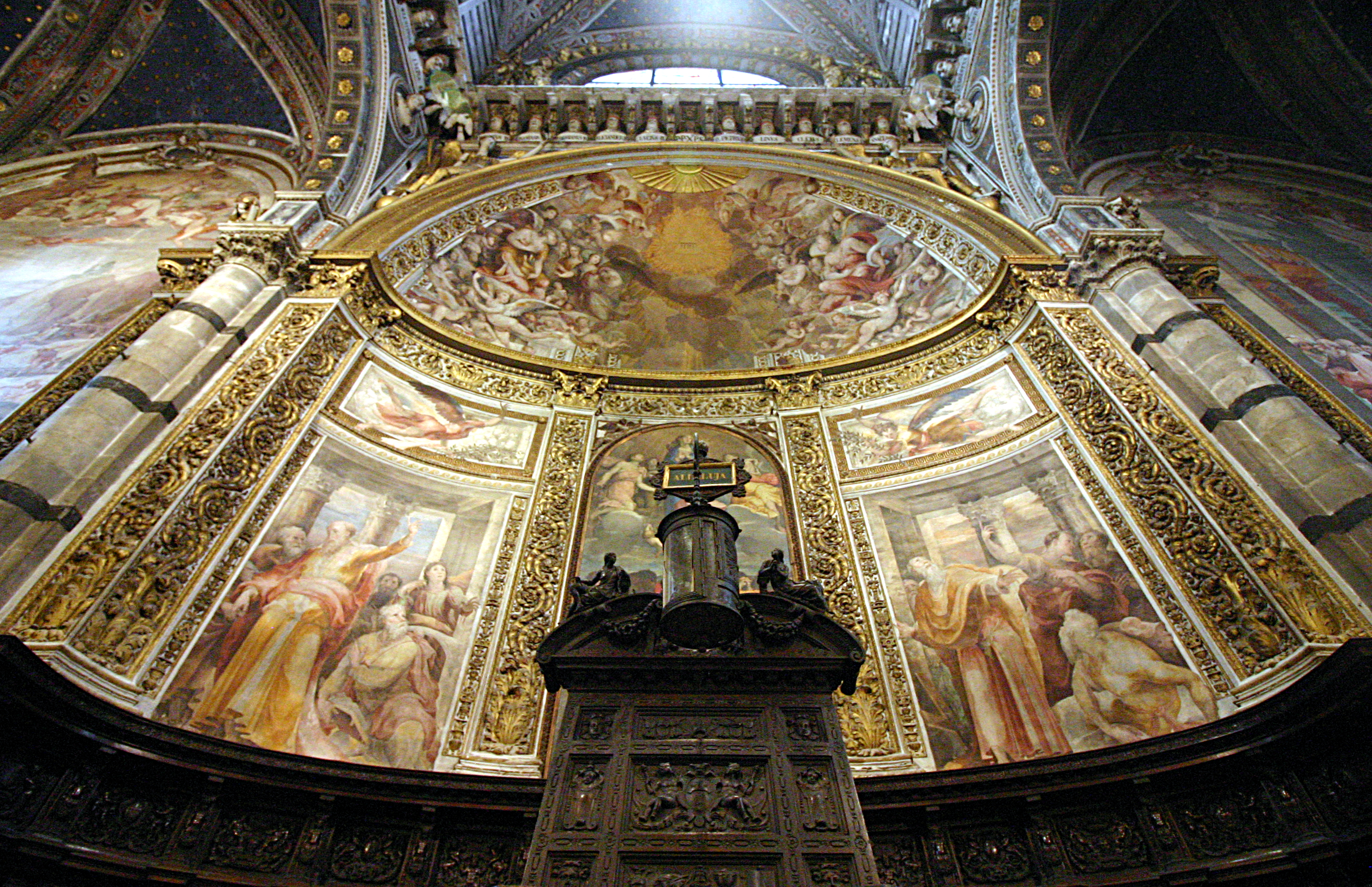 Duomo - Siena